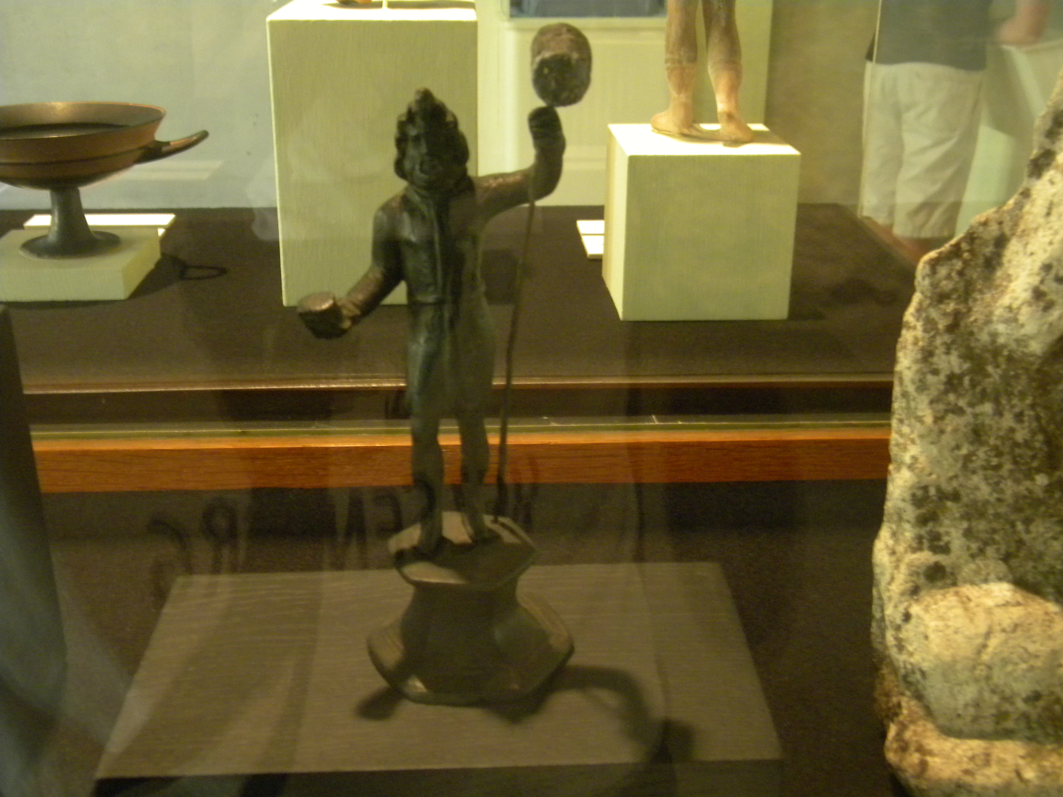 Dieu au maillet musée du vin Beaune IIème Aubaine, hameau de Crépey